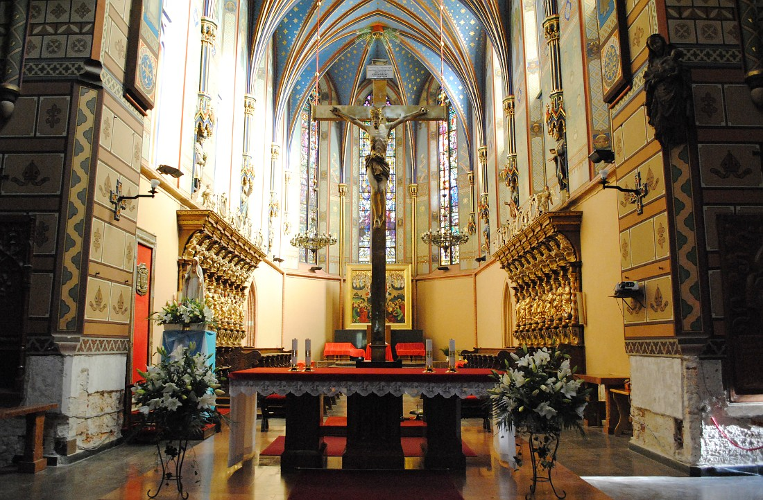 Katedra we Włocławku - Prezbiterium